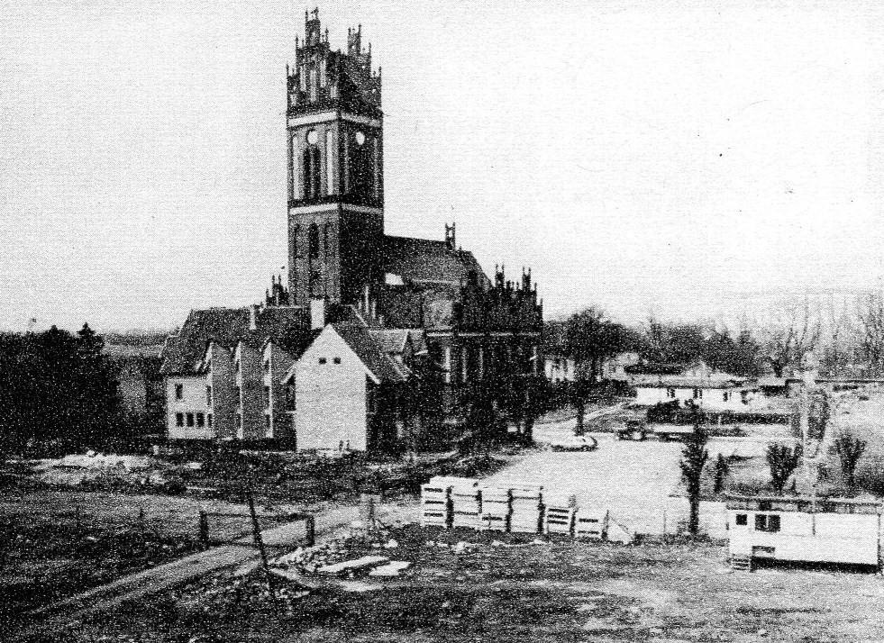 Rynek w Pieniężnie w 1987r.